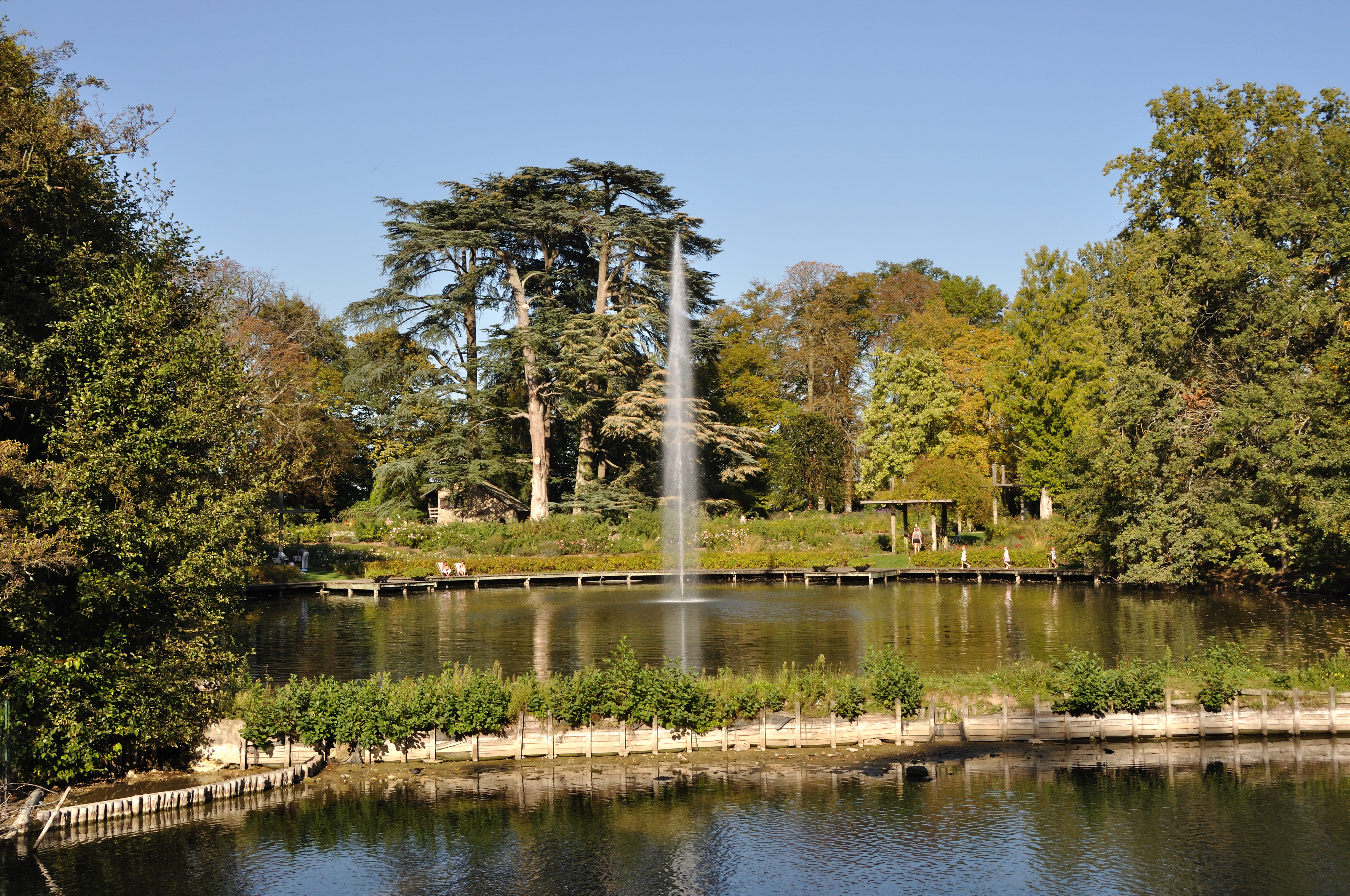 Fontaine du Parc floral de La Source à Orléans. Pièce d'eau "le Miroir", au nord du château de la Source. Vue vers le N-E.